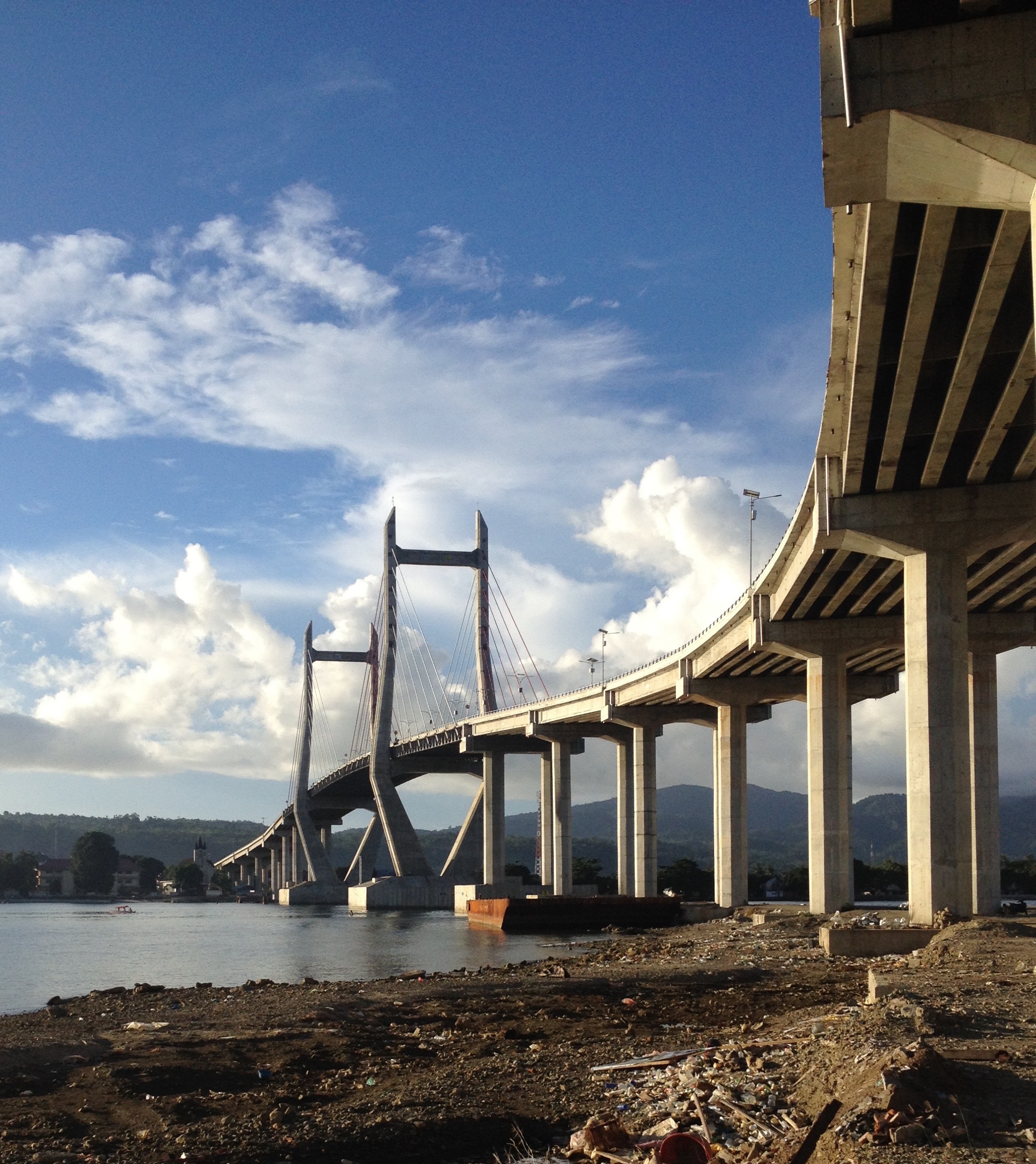 Ansicht der Merah Putih Bridge von der Südseite